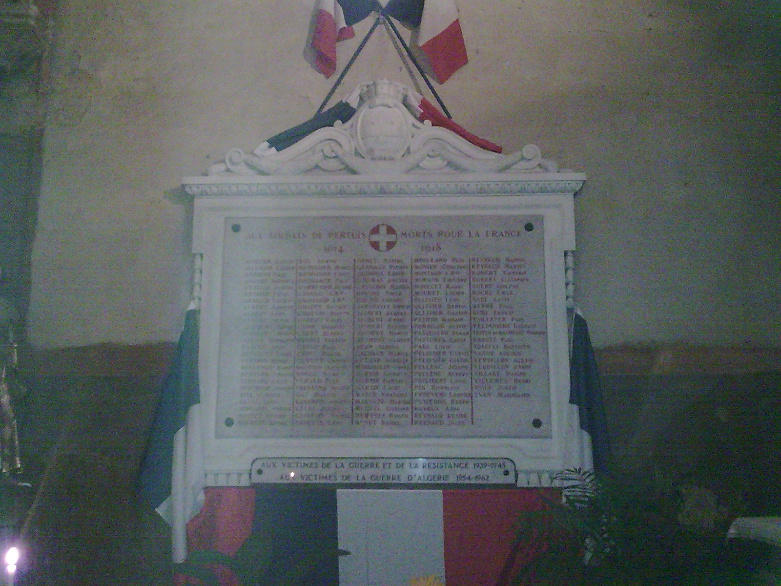 Pertuisiens mort pour la France